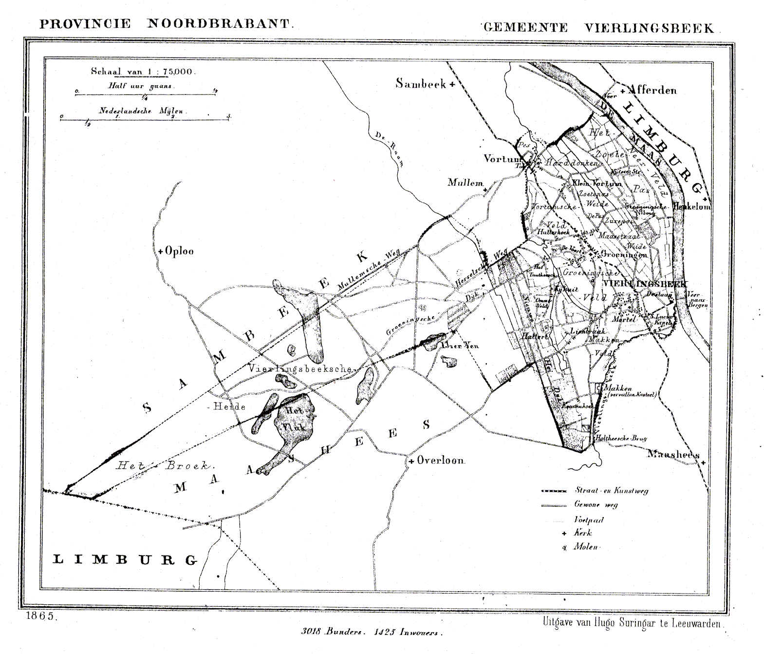 Nederland, Noord-Brabant, Gemeente Vierlingsbeek